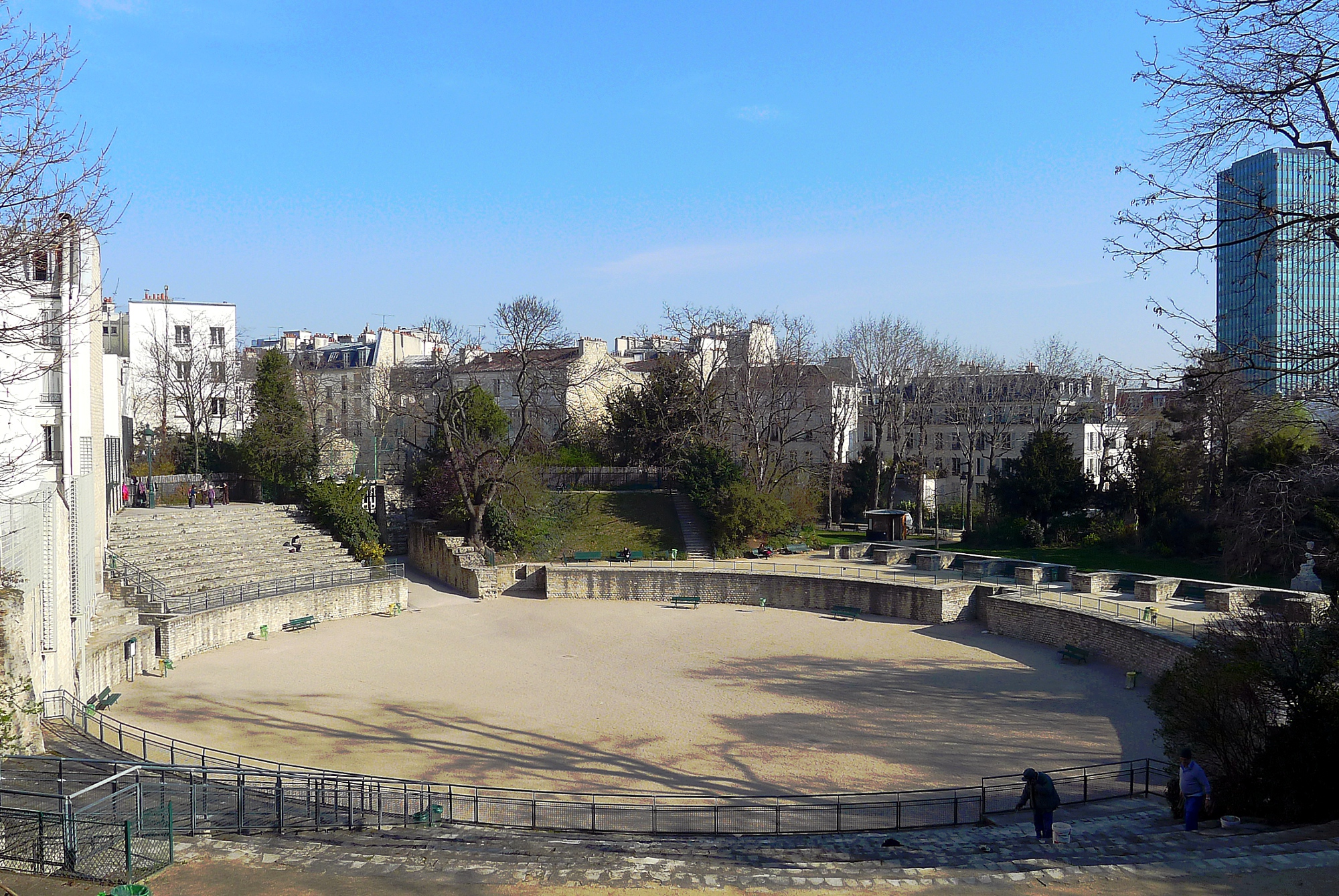 Arènes de Lutèce (en arrière-plan, la tour Jussieu) - Paris V .